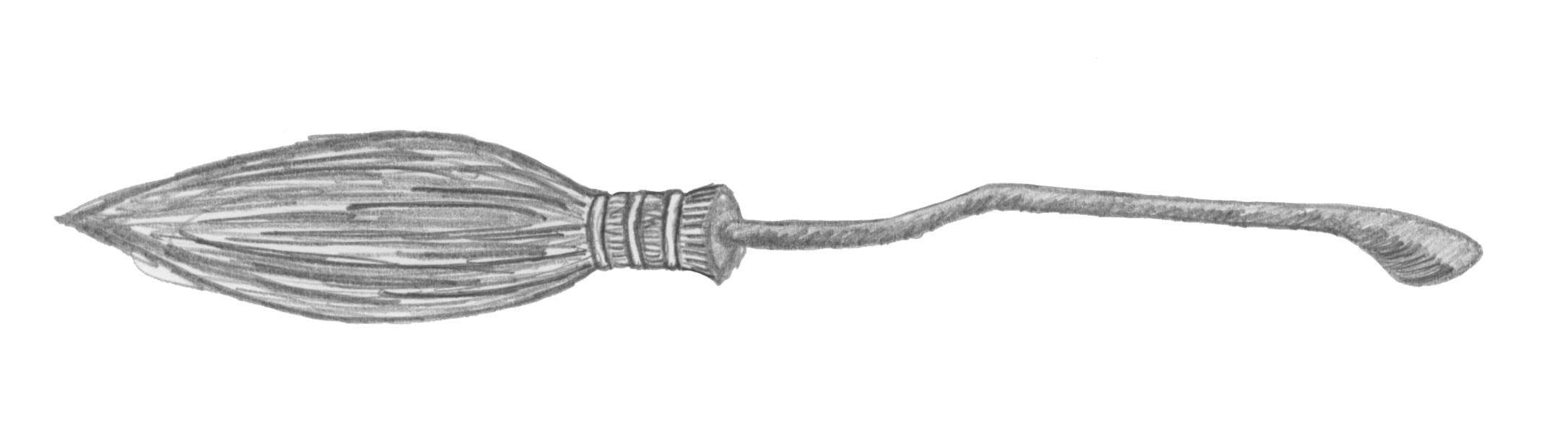 balai magique utilisé dans le monde des sorciers d'Harry Potter, notamment pour jouer au quidditch